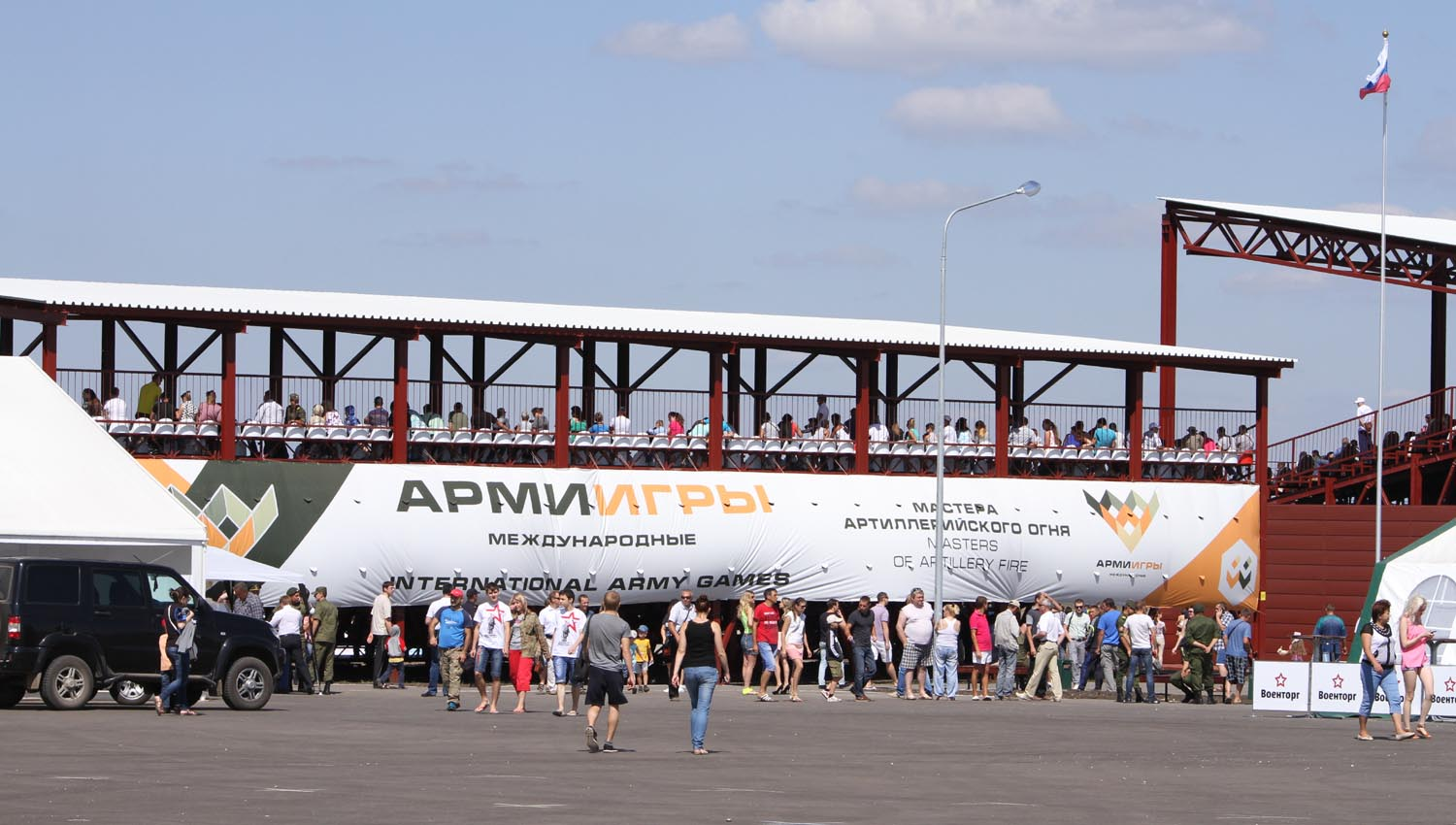 На площадке конкурса "Мастера артиллерийского огня". Конкурс в рамках "Первых международных армейских игр".